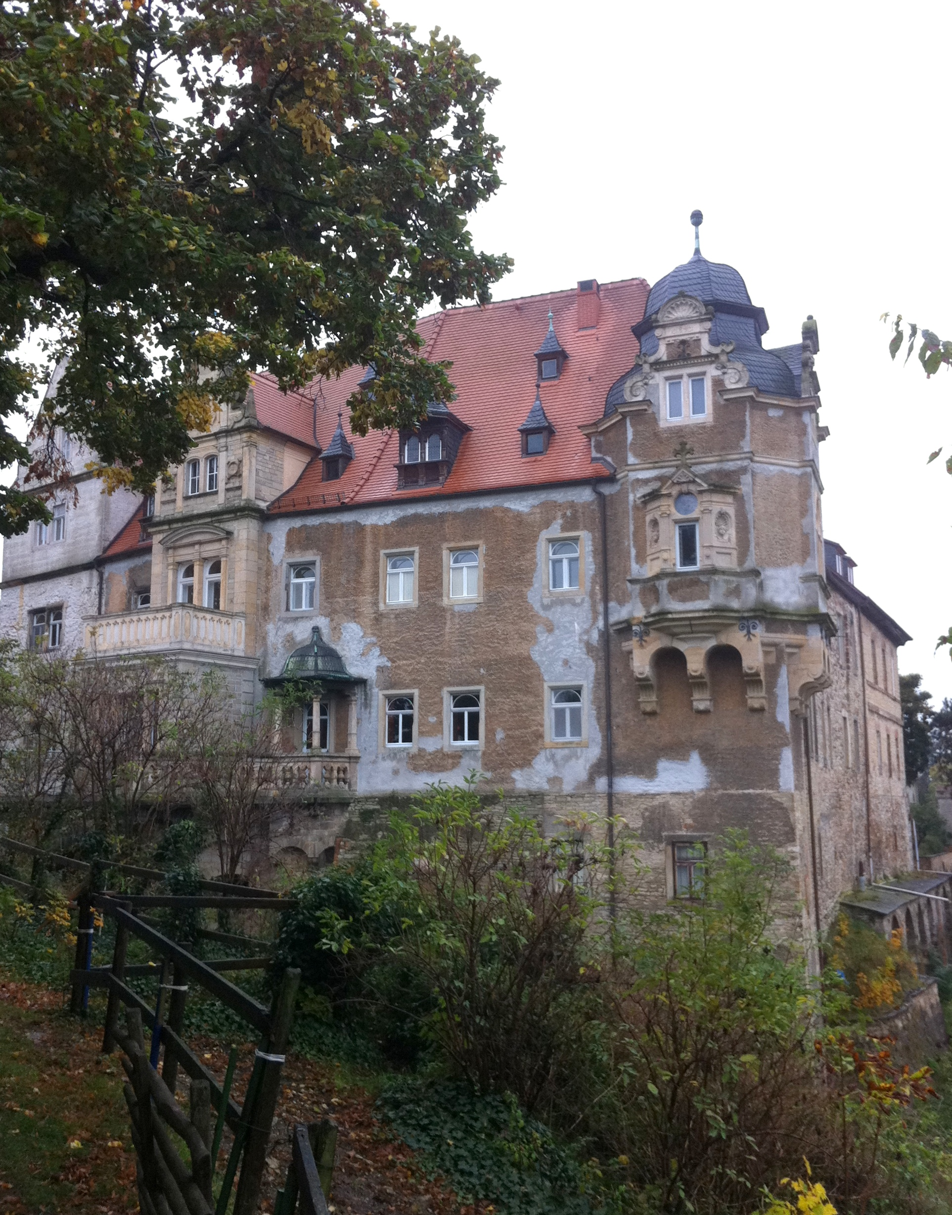 Schloss Hohenerxleben Bodeseite